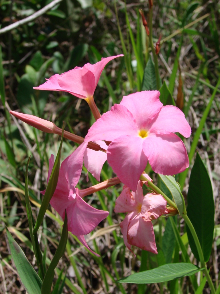 Mandevilla novocapitalis Markgr. - APOCYNACEAE - Campus da Universidade de Brasília - UnB - Brasília - Distrito Federal - Brasil.